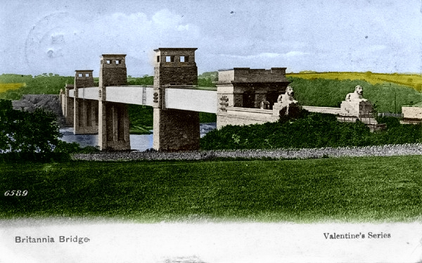 Die alte Britanniabruecke auf einer Postkarte aus der Privatsammlung von Jochem Hollestelle